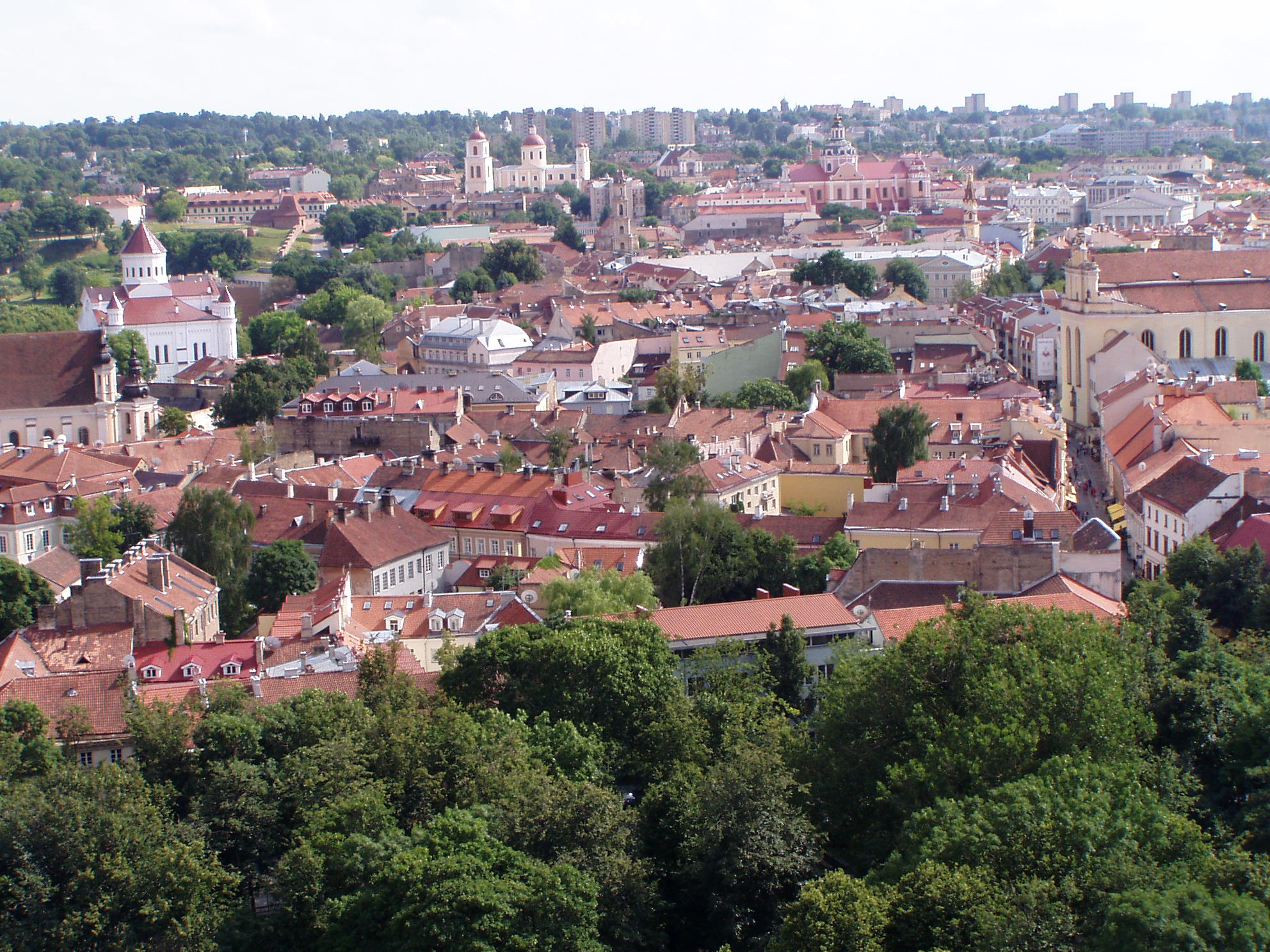 Wilno, widok z Wieży Giedymina na Wzgórzu Zamkowym